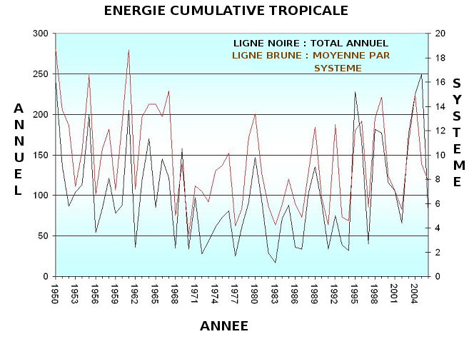 Graphique montrant l'estimation de l'énergie développée par les systèmes tropicaux dans l'Océan Atlantique nord de 1950 à 2006 selon l'indice d'Énergie cumulative d'un cyclone tropical du NWS américain (en noir) et la moyenne annuelle par système (en brun).